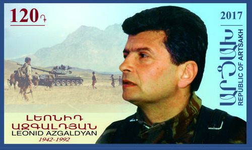 Leonid Azgaldyan